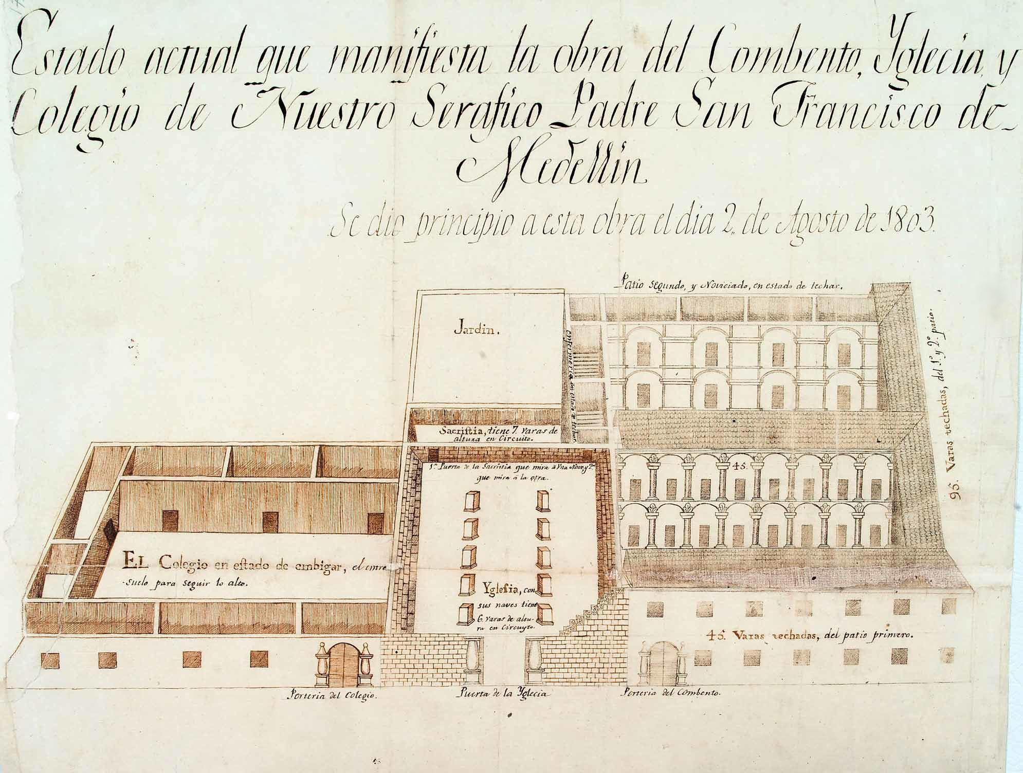 Plano del Colegio, del Convento y de la Iglesia de San Francisco (Actual Iglesia de San Ignacio), situado en la Plazuela de San Francisco, actual Plazuela de San Ignacio (1803 aproximadamente). Medellín, Colombia.